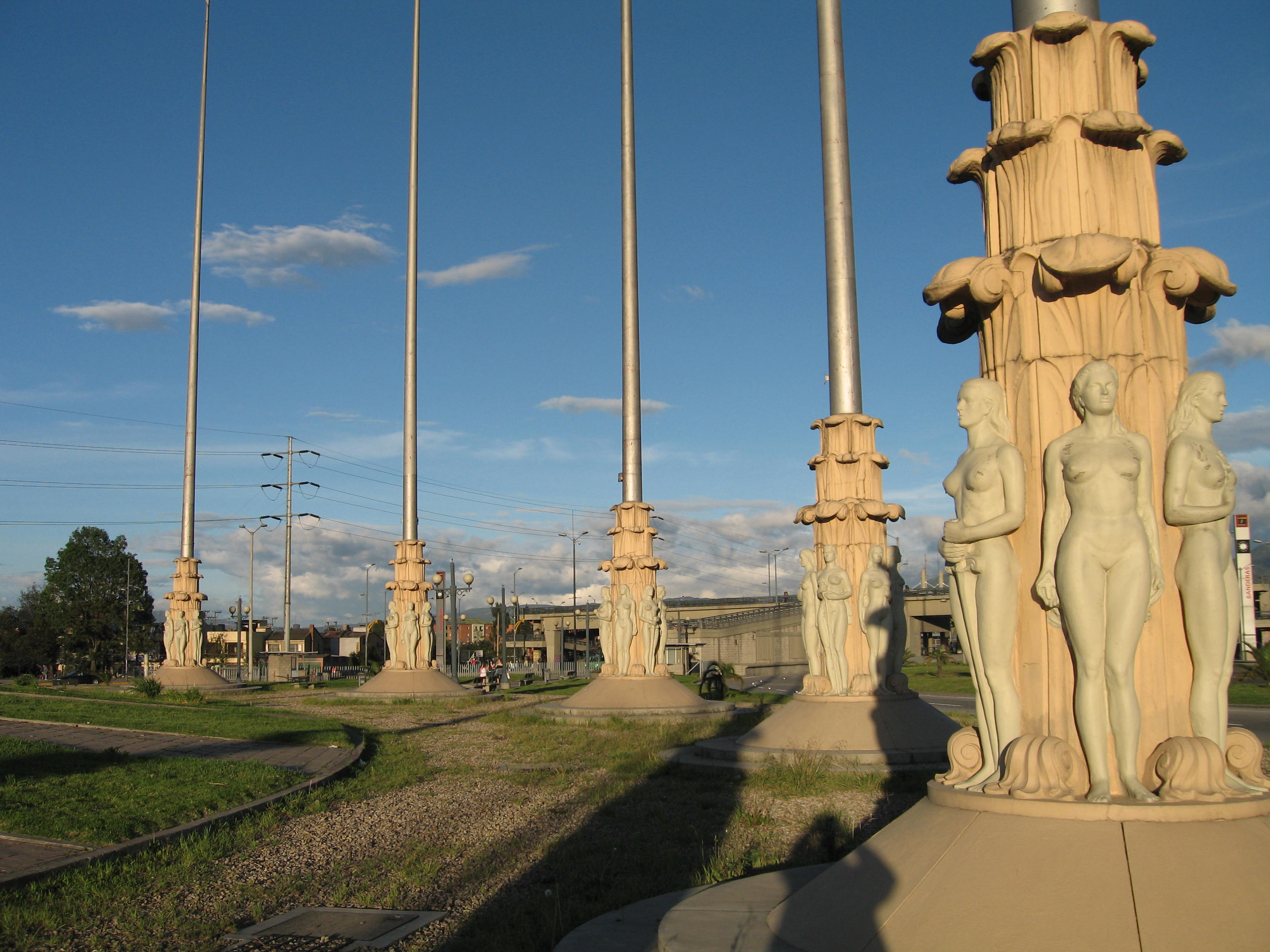 Monumento de Banderas, sector Kennedy, Bogota, Colombia